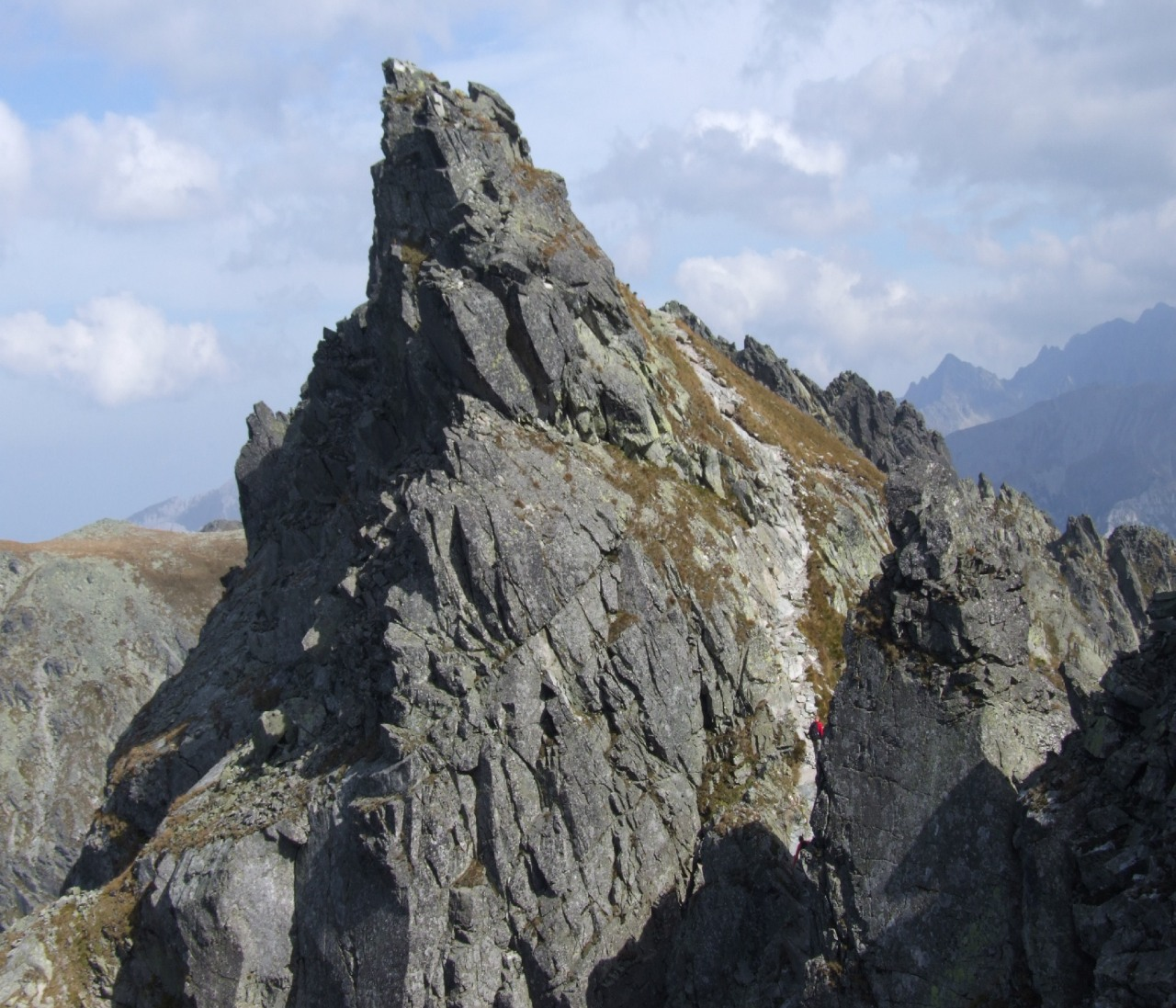 Orla Baszta, widok z Skrajnego Granatu